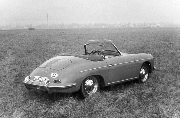 Porsche 356 Super 90 Bj. 1961